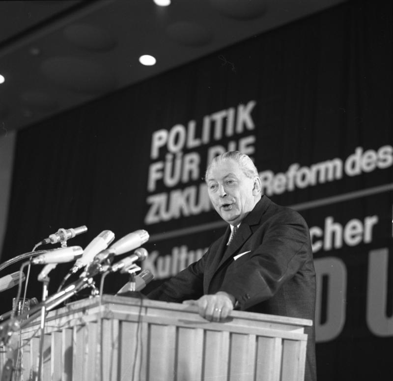 Bundeskanzler Kiesinger vor dem Kulturpolitischen Kongress der CDU/CSU in der Stadthalle Bad-Godesberg